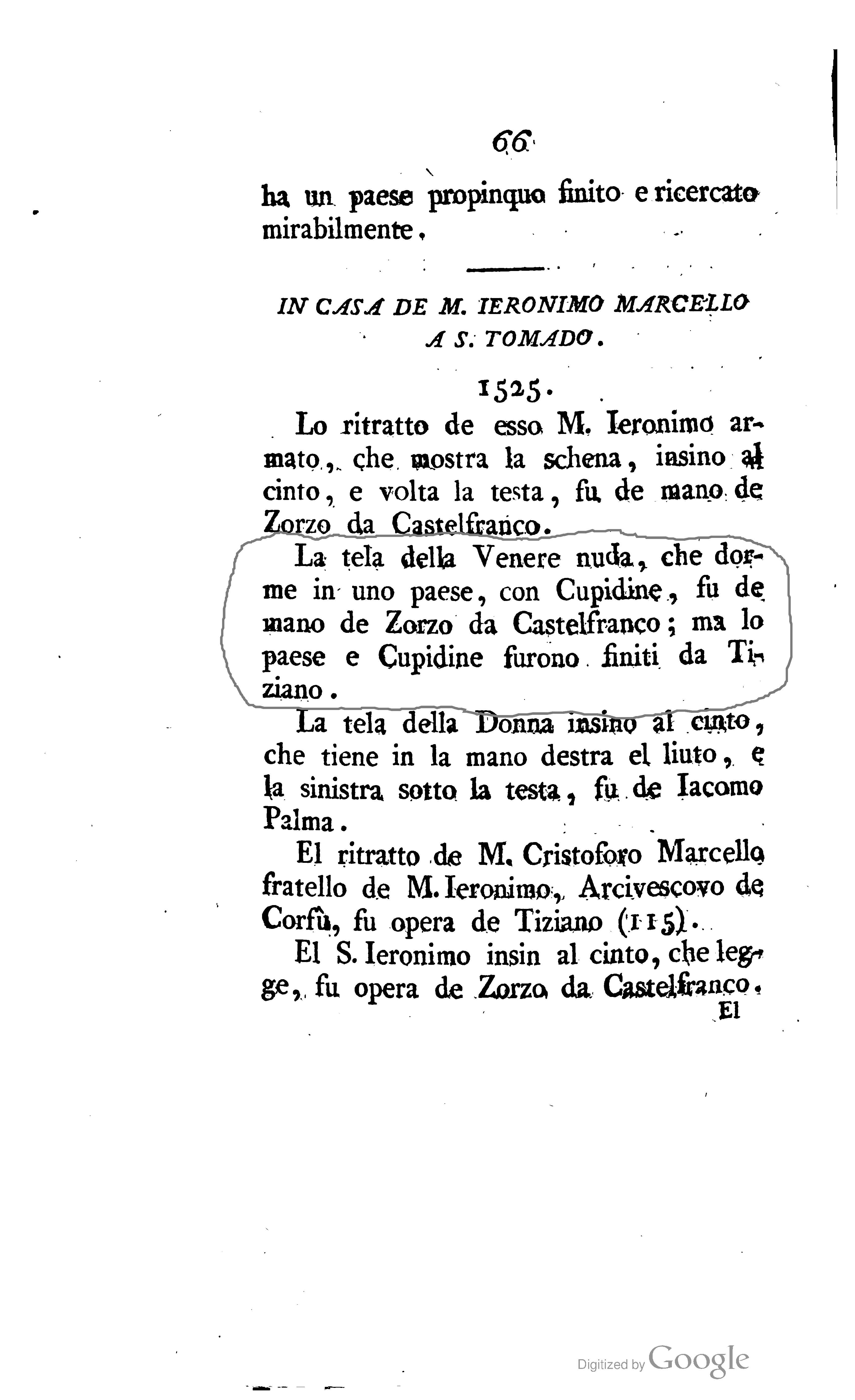 D. Jacopo Morelli: Notizia d’opere di disegno nella prima metà del secolo XVI, essistenti in Padova, Venezia, Milano, Pavia, Bergamo, Crema e Cremona, scritta da un animo die quel tempo, pubblicata e illustrata Bassano 1800, Seite 66, (Hervorhebung durch User:A. Wagner)